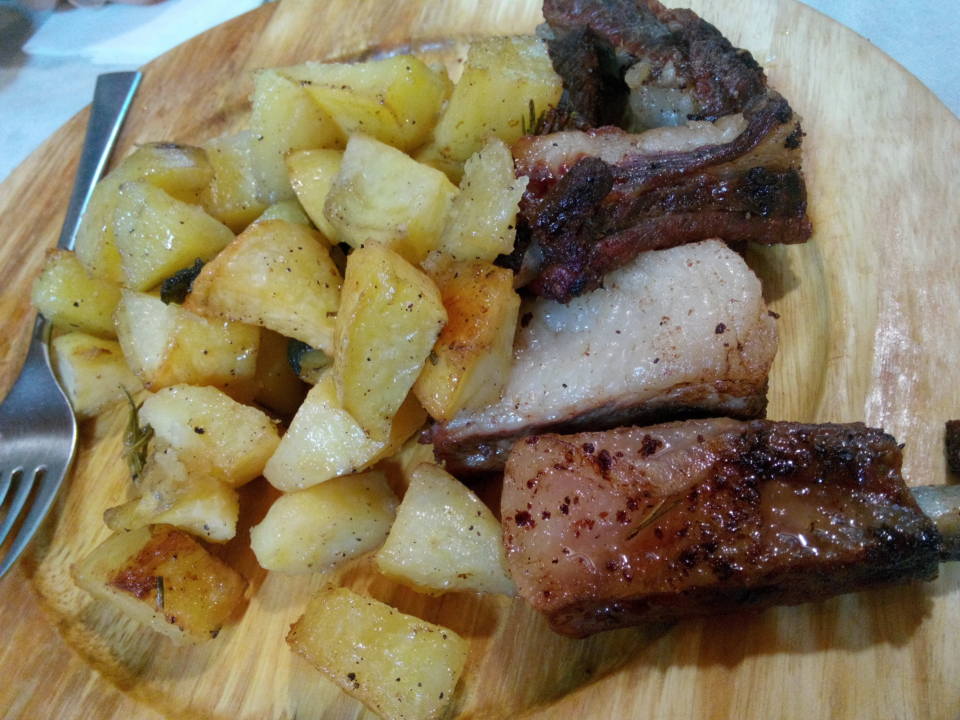 Rosticciana con patate arrosto